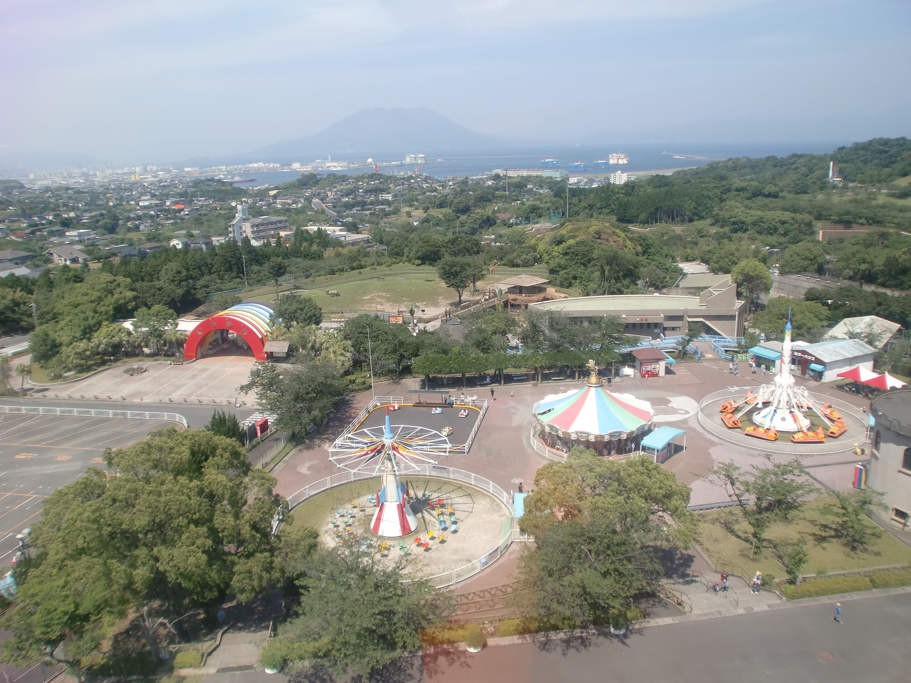 鹿児島市平川動物公園を園内の高台にある遊園地から桜島方面を眺める。